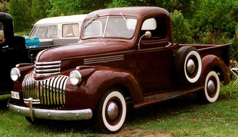 Chevrolet Pickup 1946